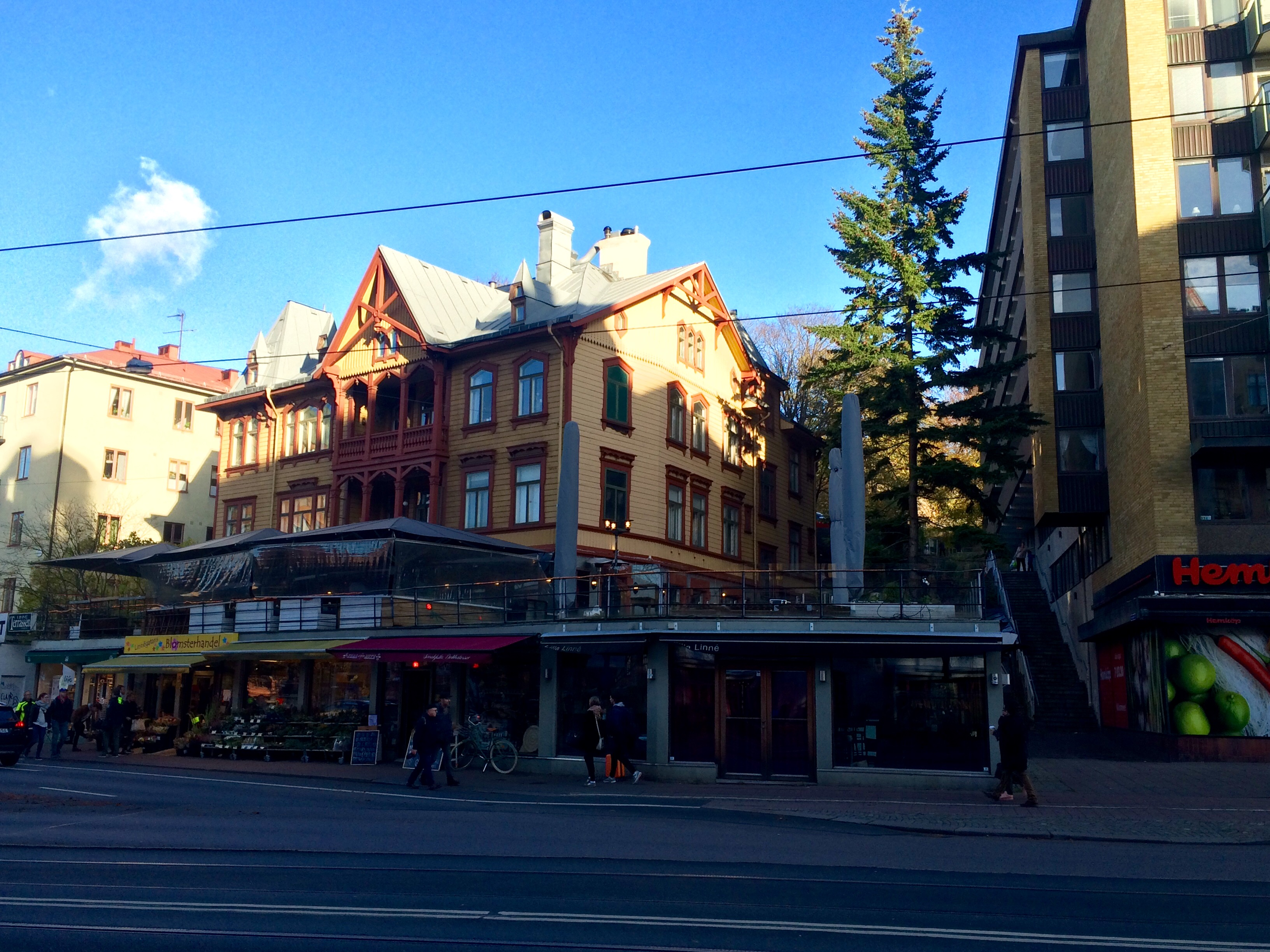 Villa Ideborg vid Linnégatan 32 A, uppförd 1897 efter ritningar av arkitekt Oscar W. Nilsson.